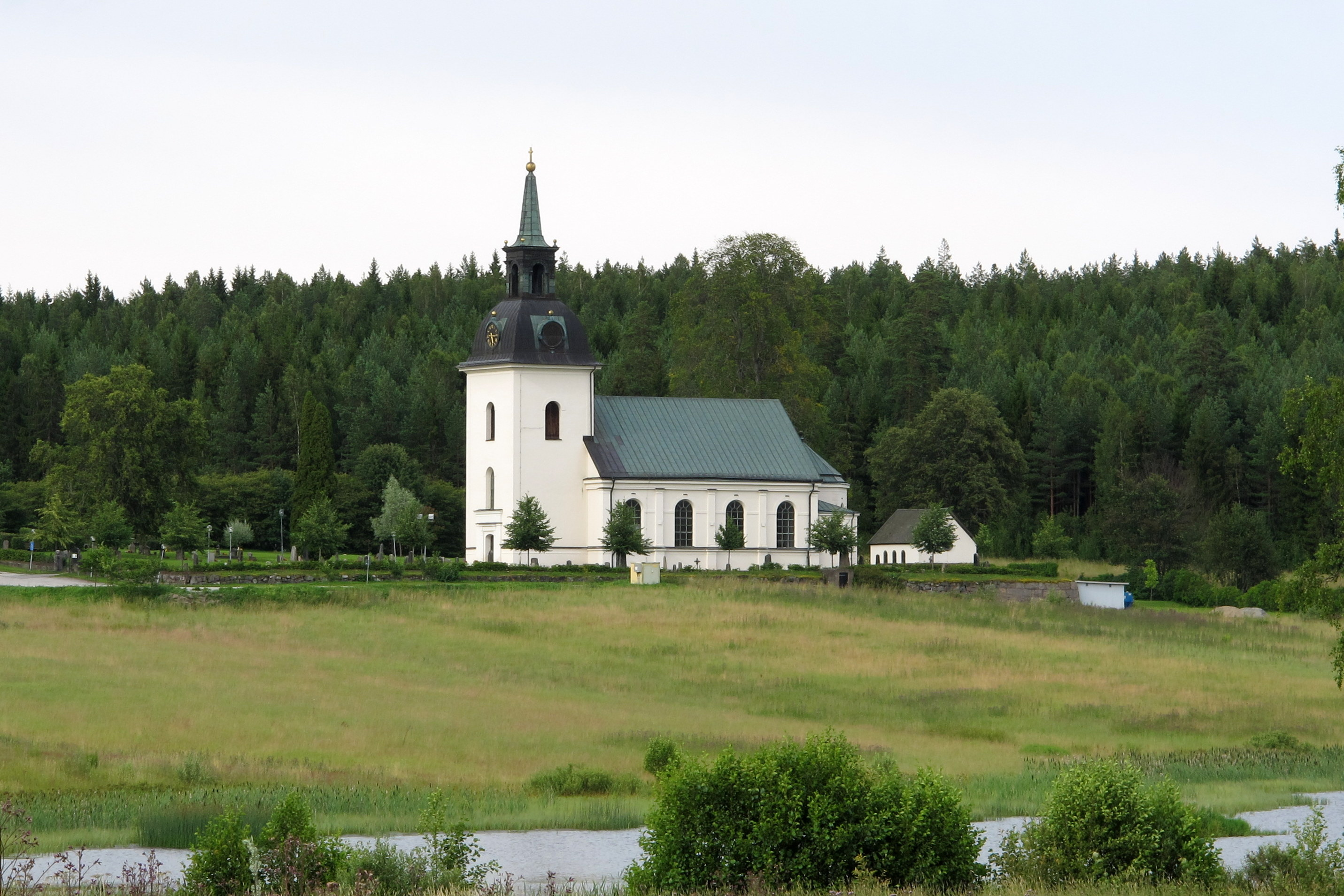 Västervåla kyrka i juli 2015